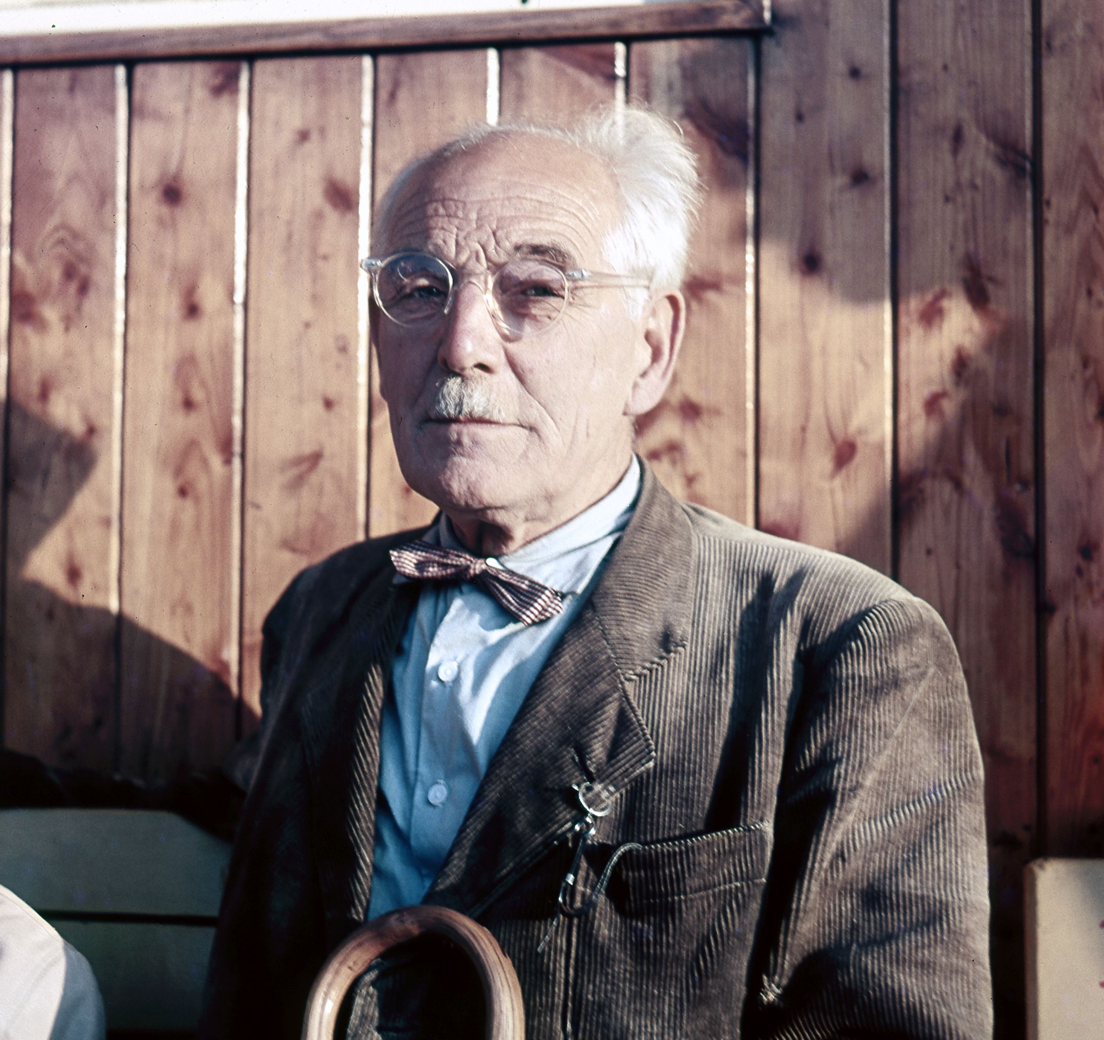 Bruno Valoušek, bývalé autobusové nádraží ve Zlíně, začátek 60. let, autor: Tomáš Valoušek